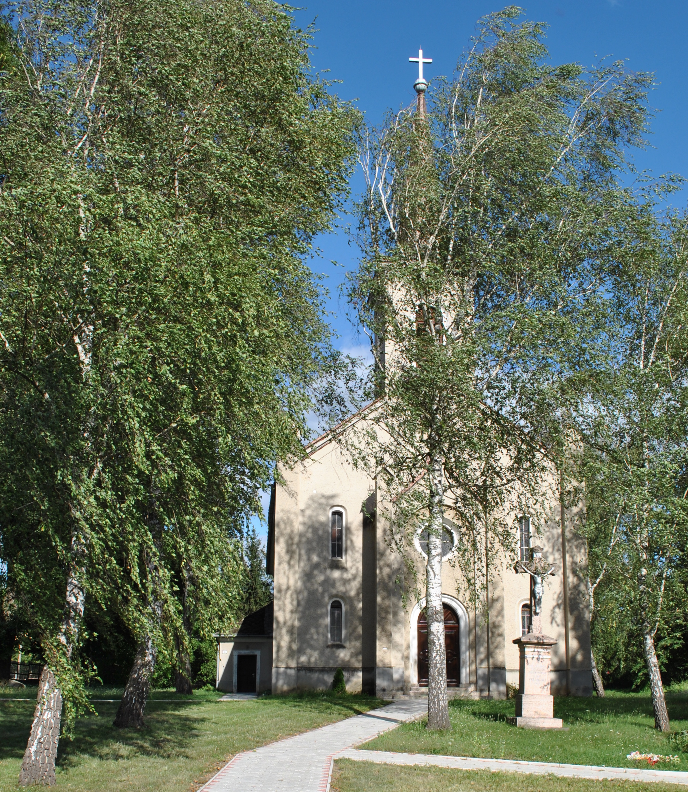 Felsőtúri katolikus templom